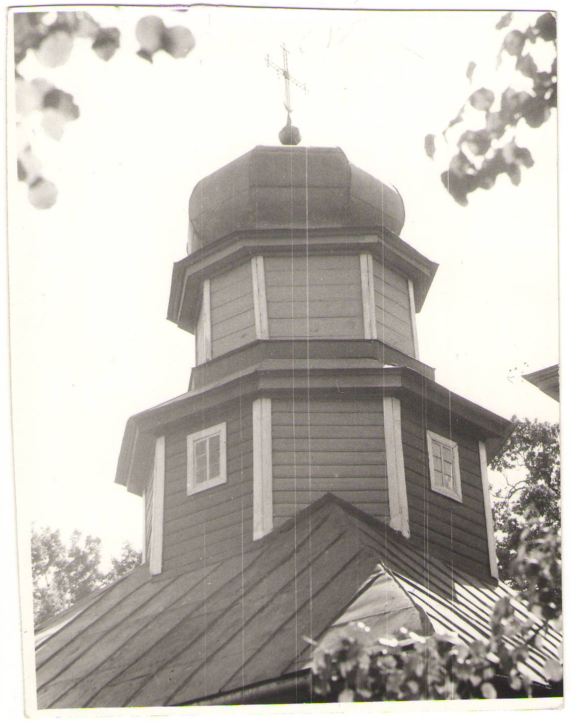 Беларуская (тарашкевіца): Усьпенская царква. в. Кашэвічы This is a photo of Belarusian heritage monument. Reference number: 312Г000567 ( WLM)